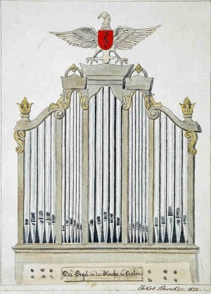 Ehemalige Orgel der Stadtkirche Aalen von Georg Friedrich Schmahl, erbaut 1769, ausgebaut 1885 Zeichnung von 1872